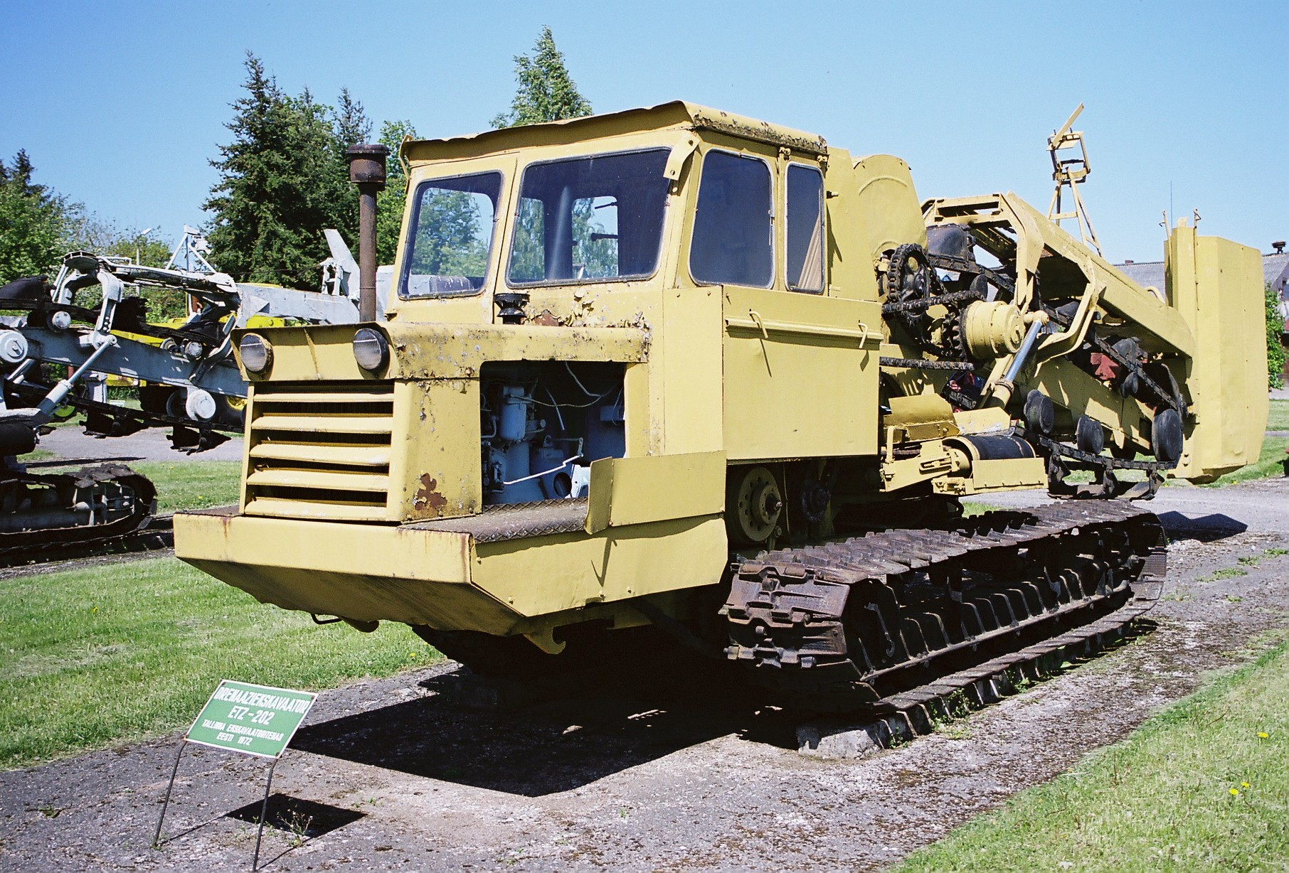 Drenaažiekskavaator ETZ-202, Tallinna Ekskavaatoritehas, 1972